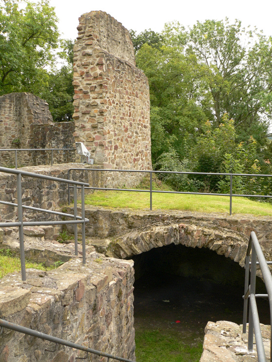 Burg Jesberg, Gewölbe